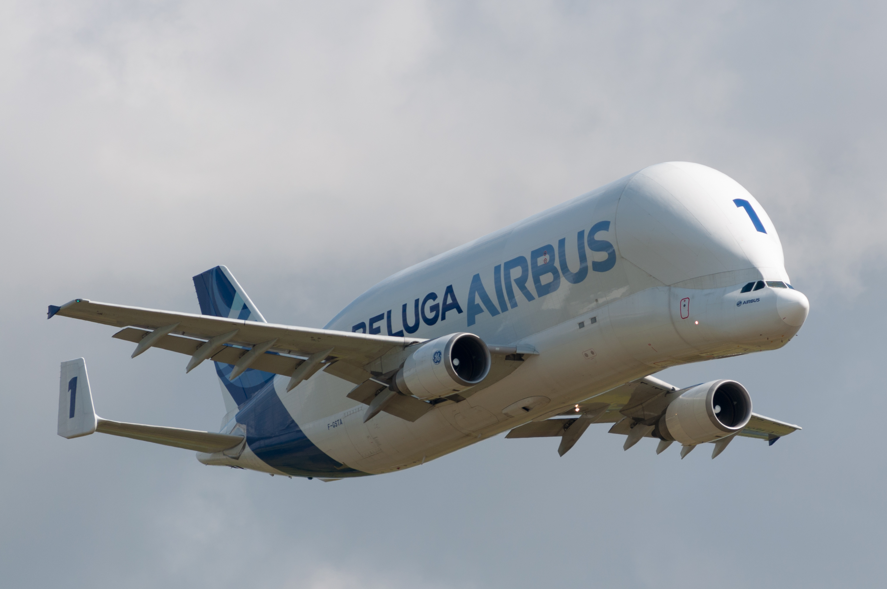 Un Airbus A300-600ST « Béluga » lors de l'Airexpo 2014.